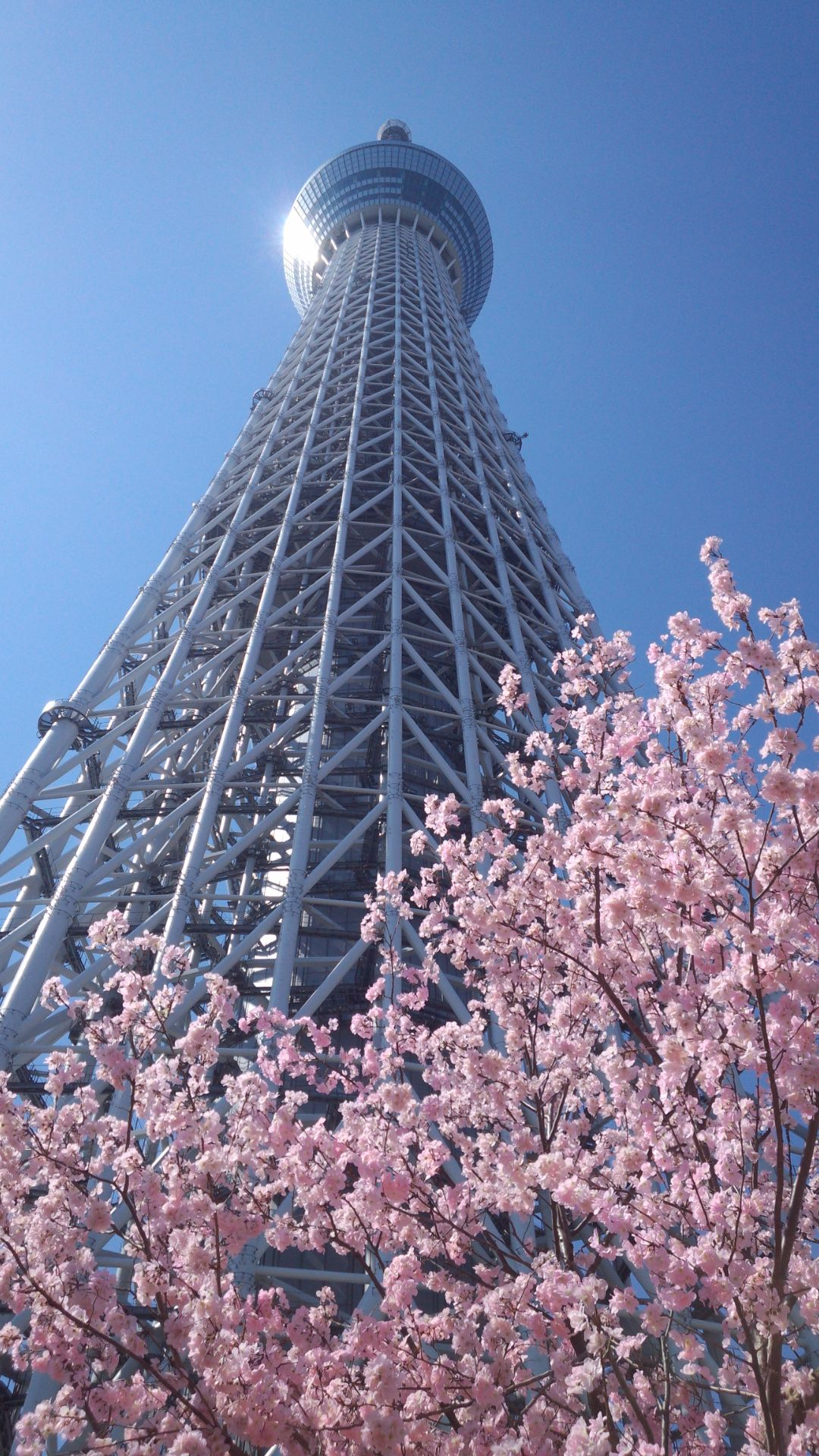 東京スカイツリーと桜（2014年3月23日）